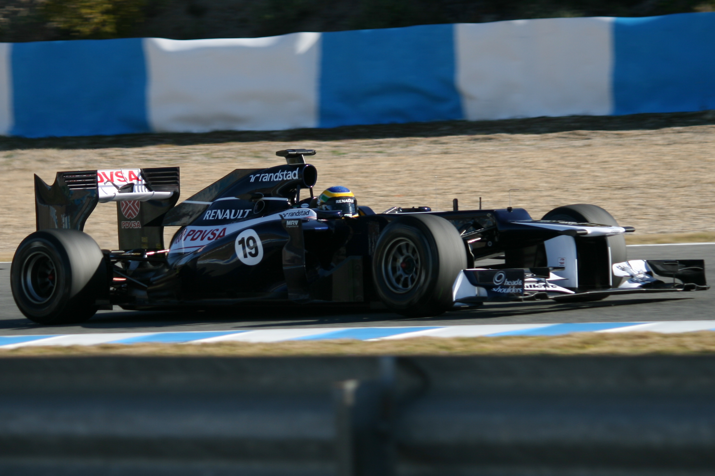 Bruno Senna testando Williams FW34 em Jerez